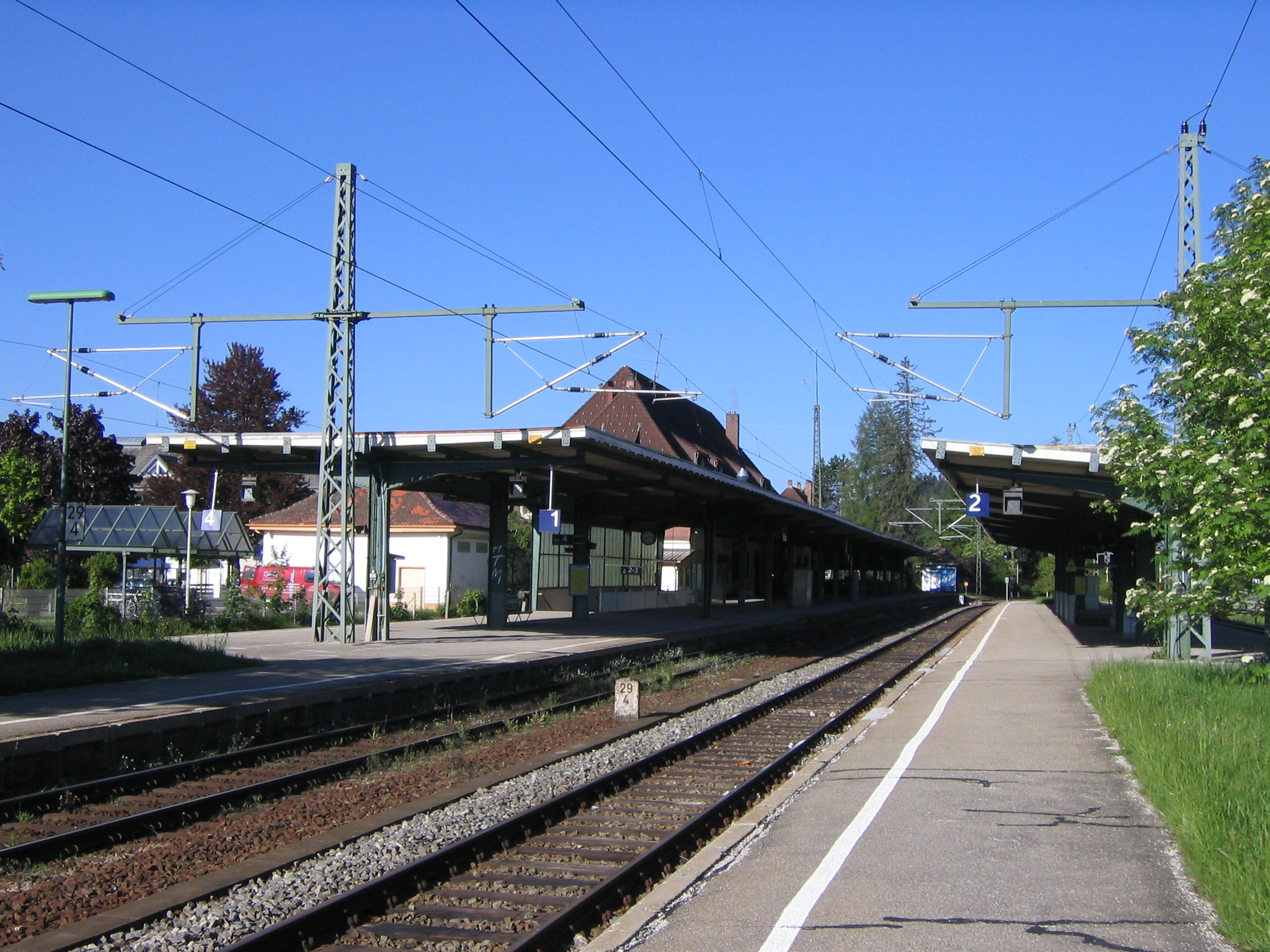 Bahnhof Titisee im Hochschwarzwald